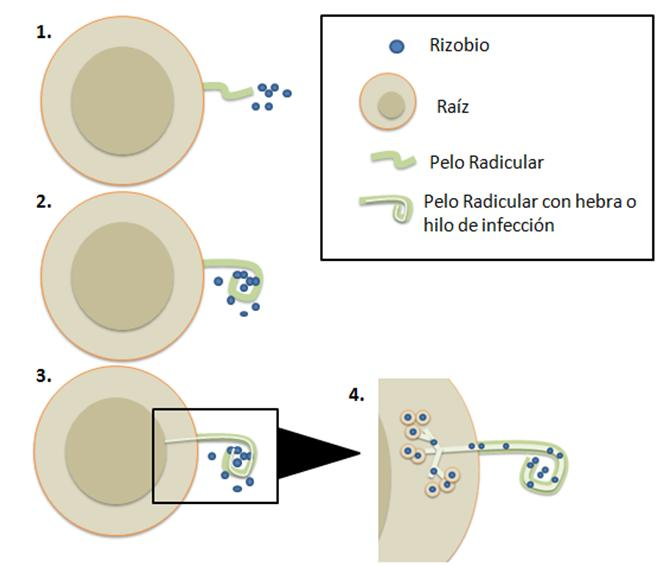 Se muestra, paso a paso el proceso de infección de los rizobios a la planta hospedera, para finalmente formar los nódulos radiculares.